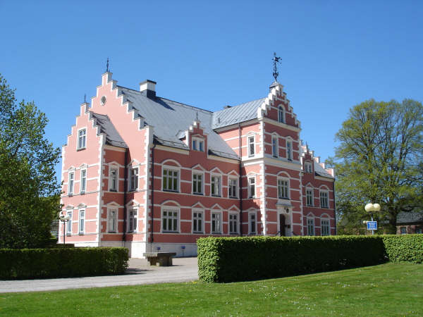 Pålsjö castle, Helsingborg